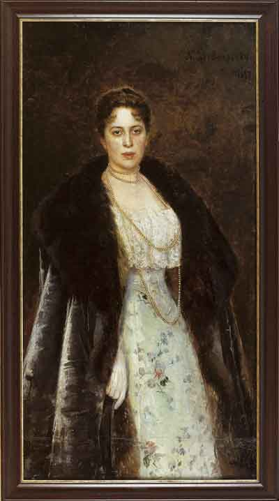 Портрет Маргариты Кирилловны Морозовой работы Н. К. Бодаревского